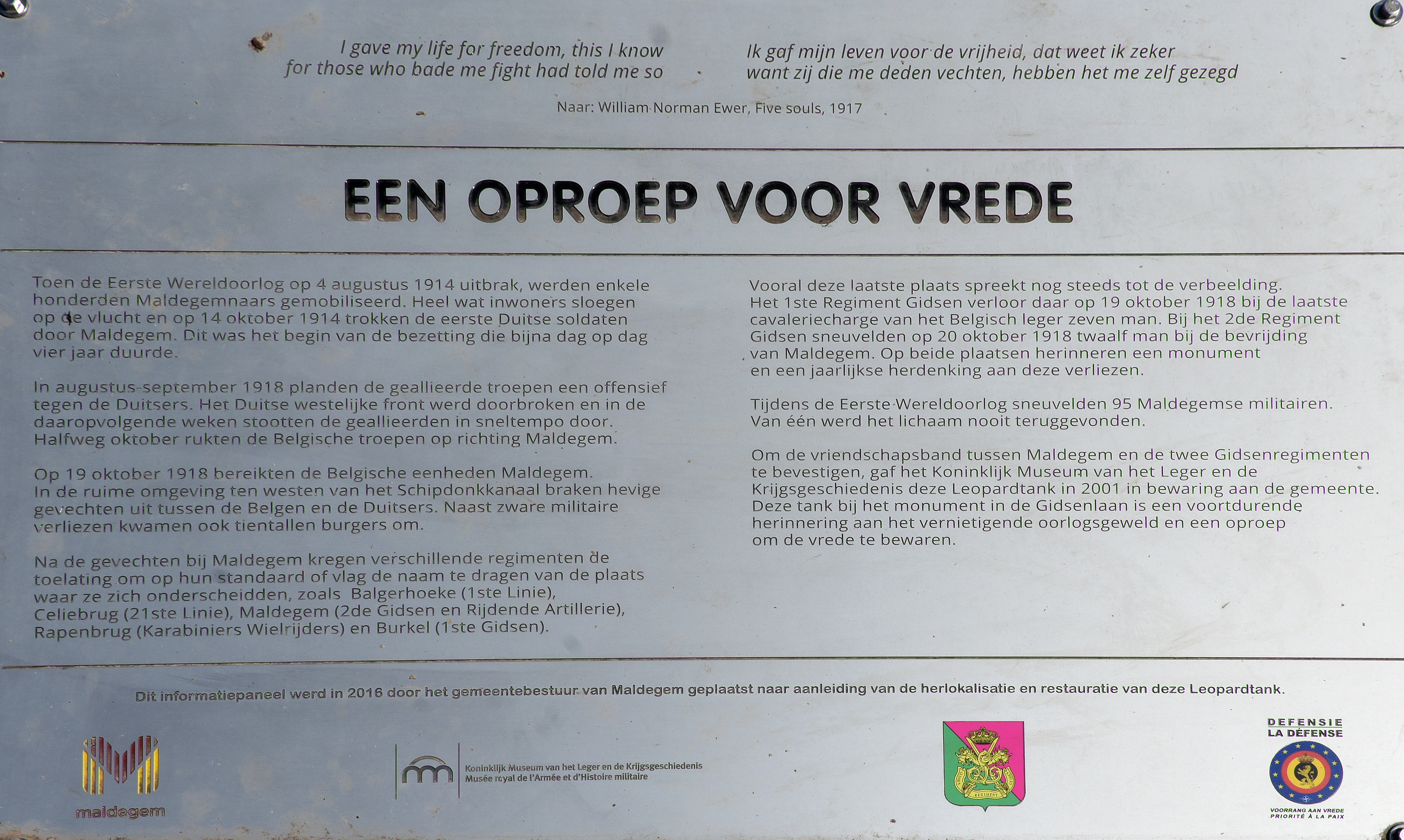 plaquette bij het tankmonument van Maldegem, België